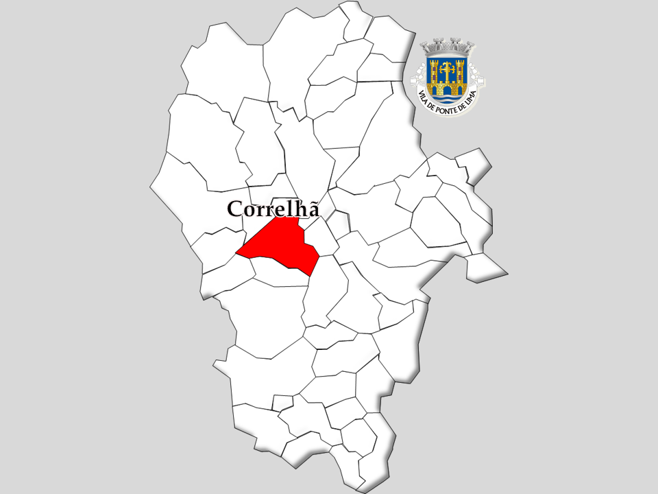 Censos 1864/2011